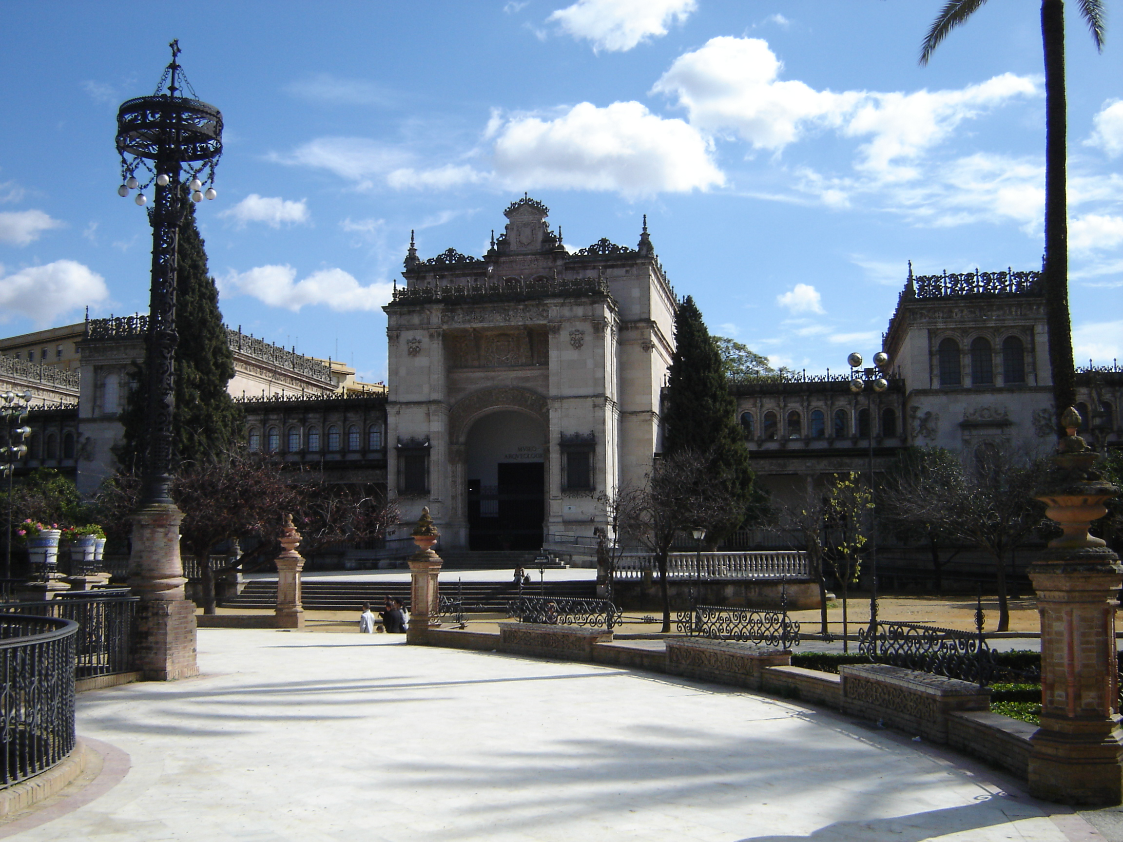 Museo Arqueológico (Plaza de América), en el Parque de María Luisa (Sevilla). Visto desde la fuente central de la Plaza de América. Realización propia.